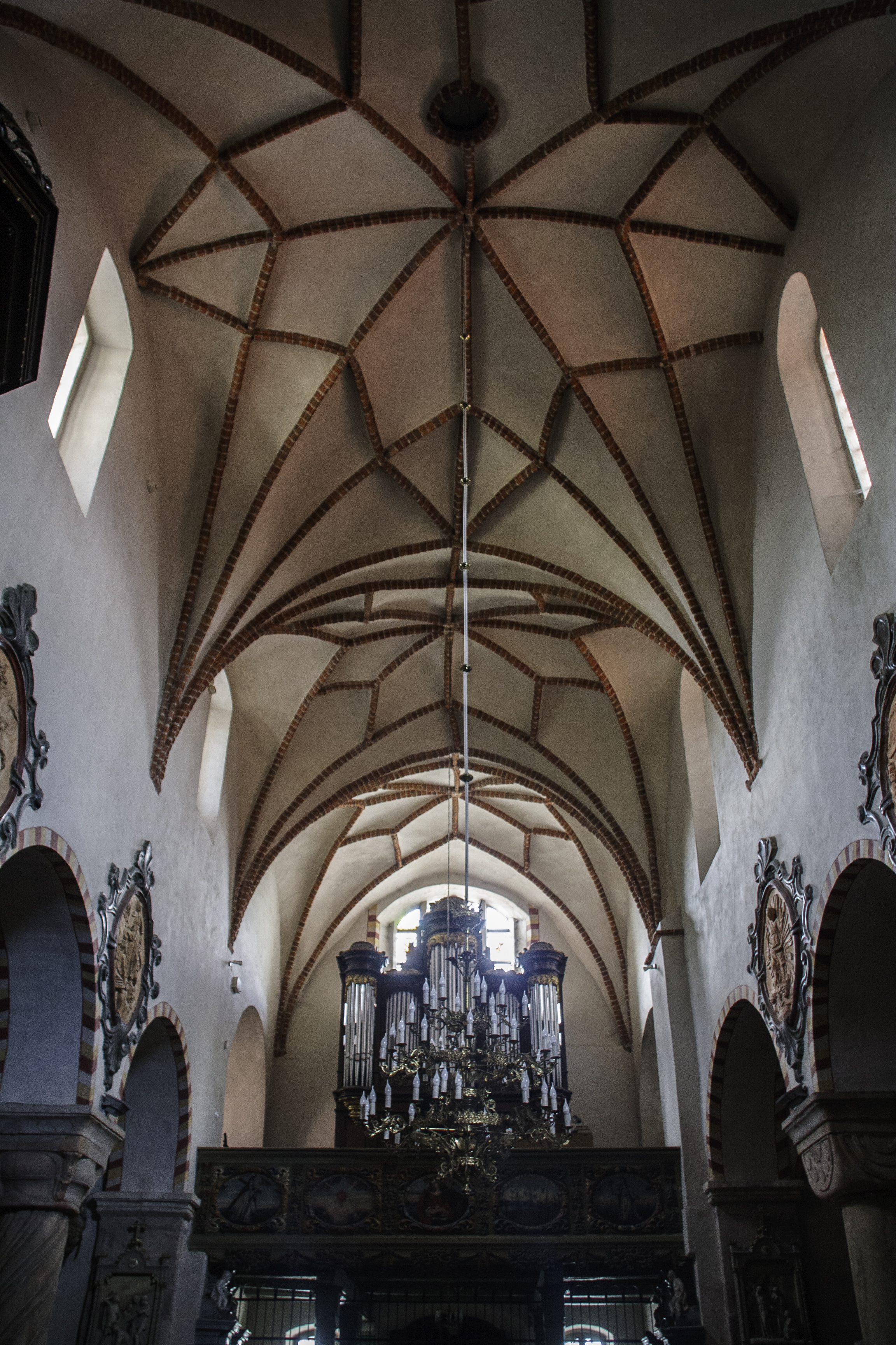 Sklepienie Kościóła Świętej Trójcy i Najświętszej Marii Panny w Strzelnie